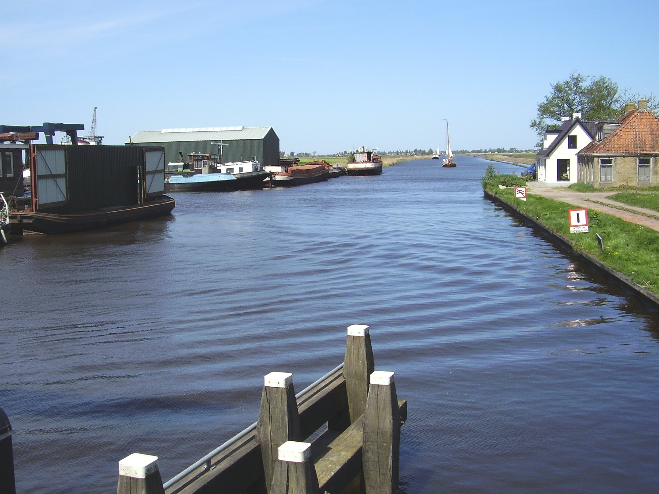 De Wijde Wijmerts bij Osingahuizen in Friesland, Nederland